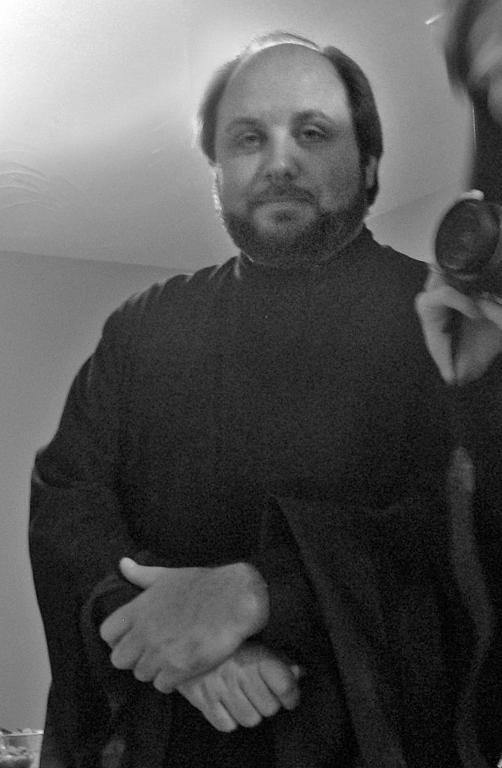 Диакон Николай Ольховский в 2009 году